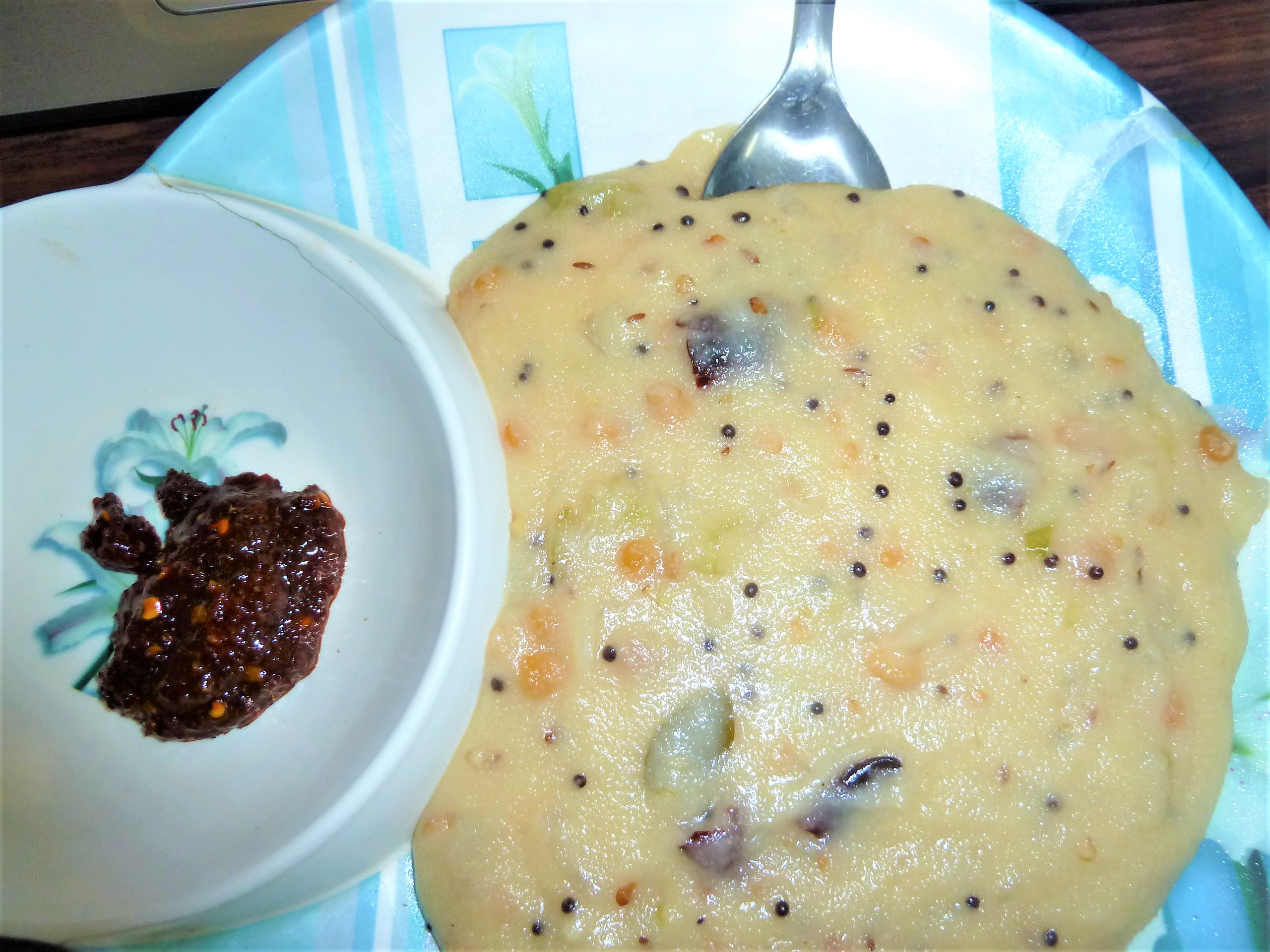 బొంబాయి రవ్వ ఉప్మా